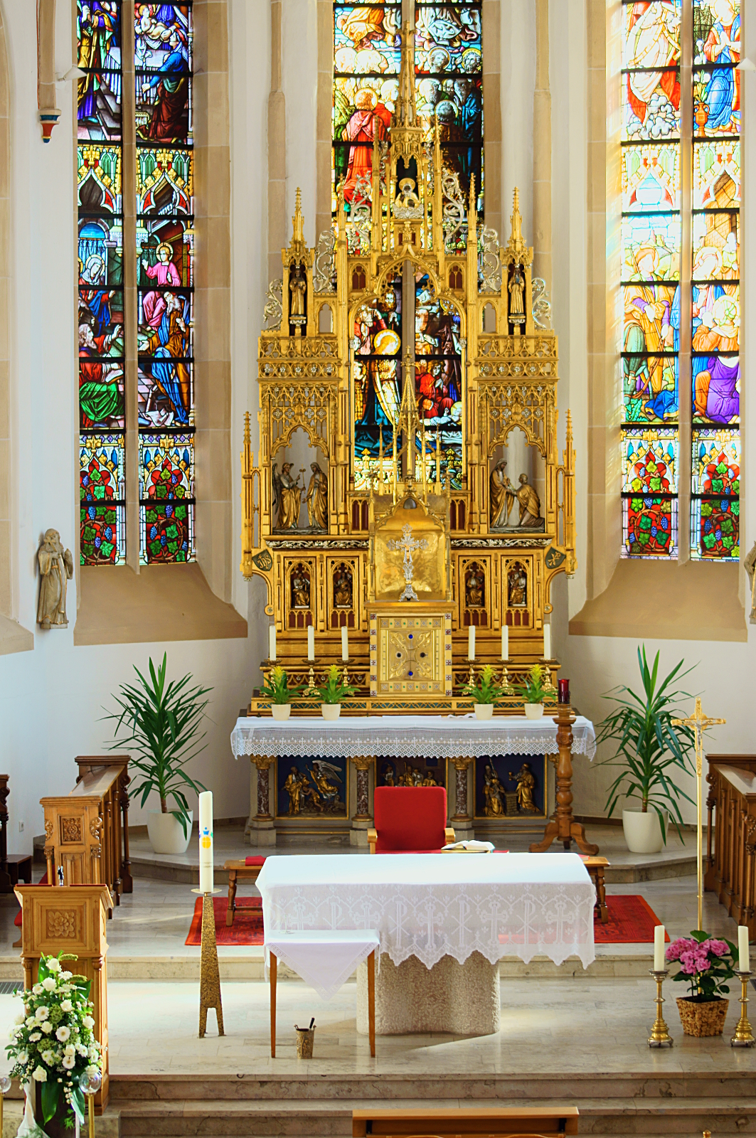 Der neugotische, mit marianischen Szenen versehene Hochaltar in der Klosterkirche St. Marien in Burlo stammt ebenso wie die dahinter sichtbare Chorfensterverglasung aus dem ausgehenden 19. Jahrhundert. Davor der neue Altar. This is a photograph of an architectural monument. A1 - A 26